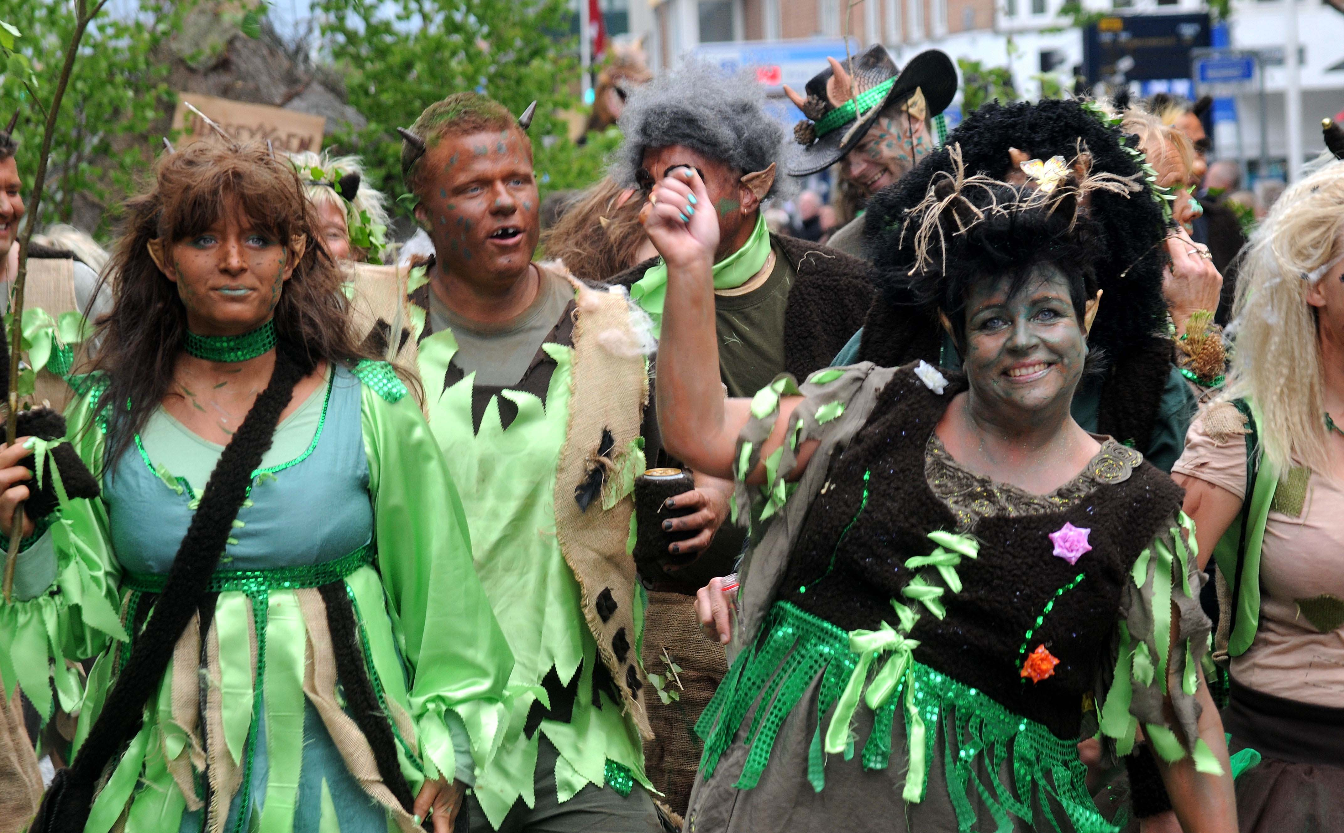 Parade 2011